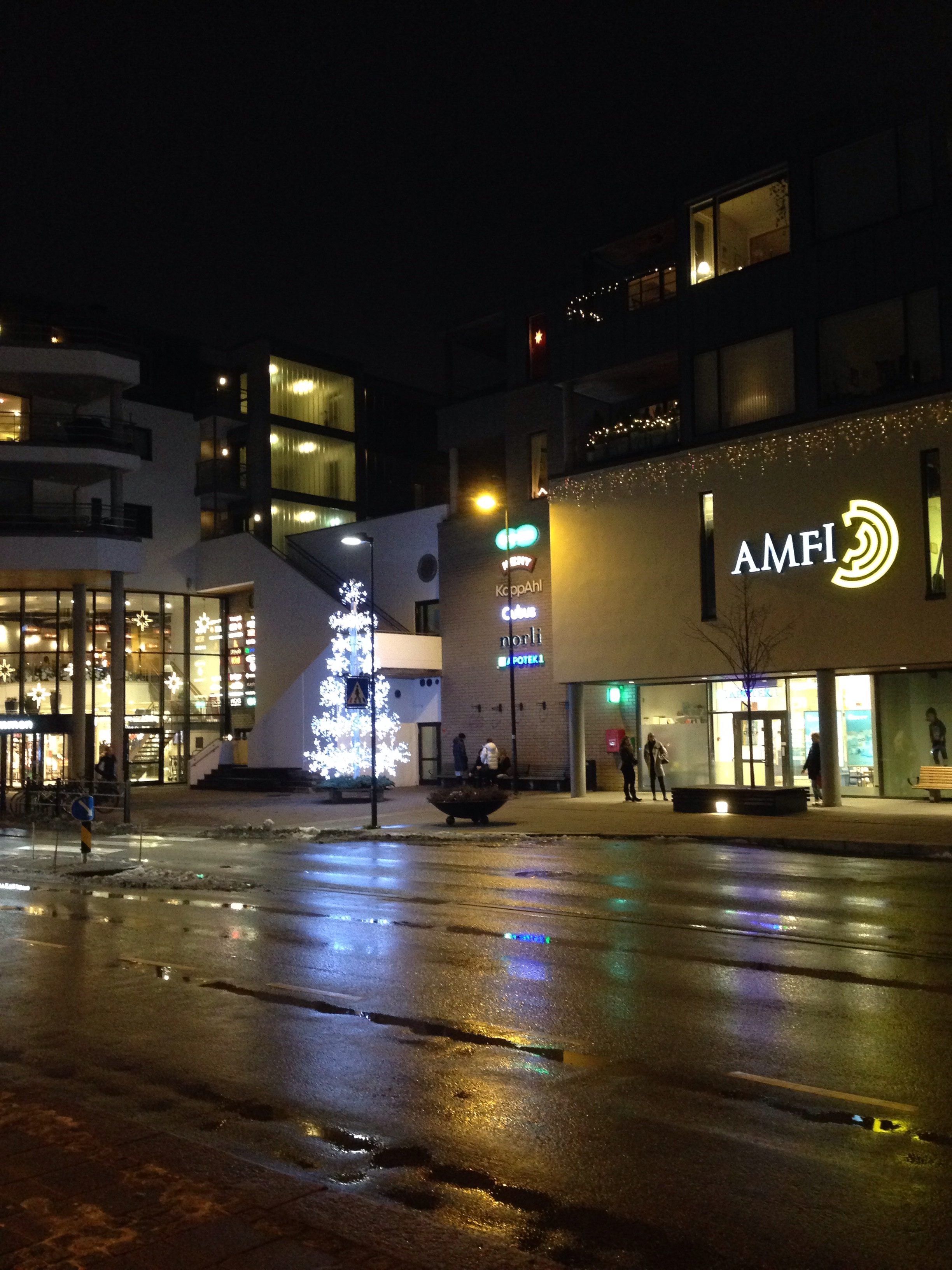 Amfi Arendal